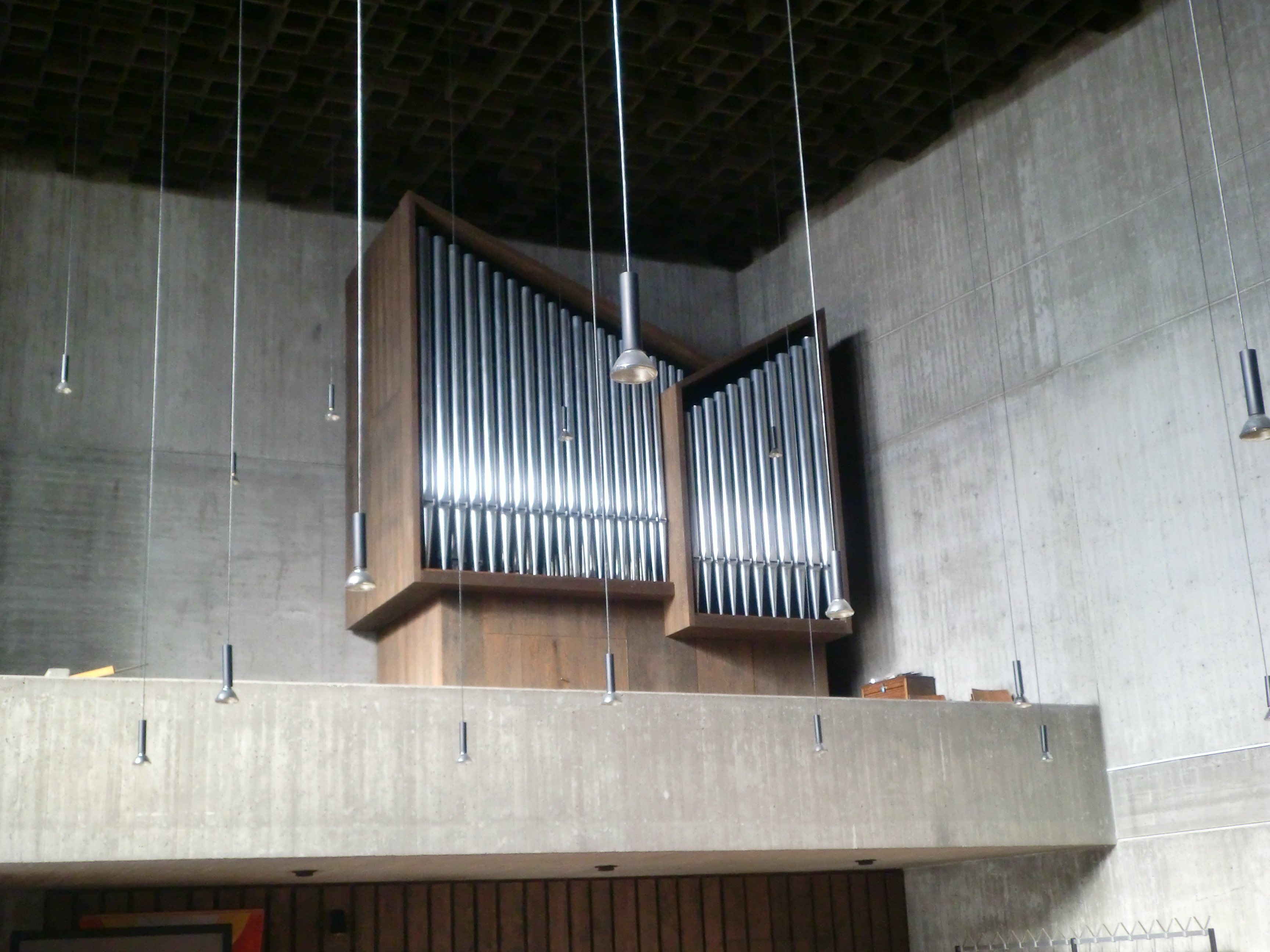 Orgel der Jakobuskirche Mannheim